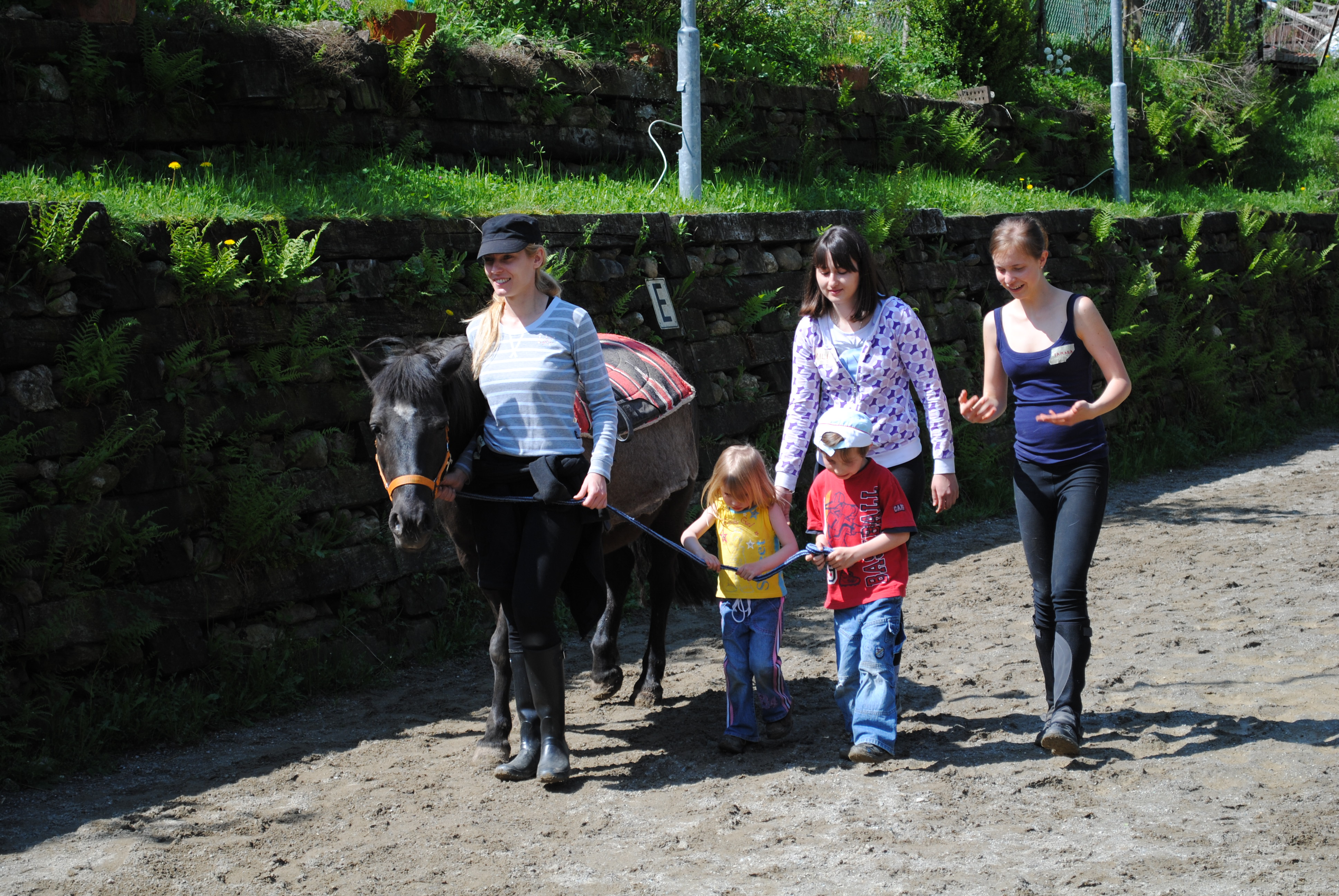 Пример хипотерапије